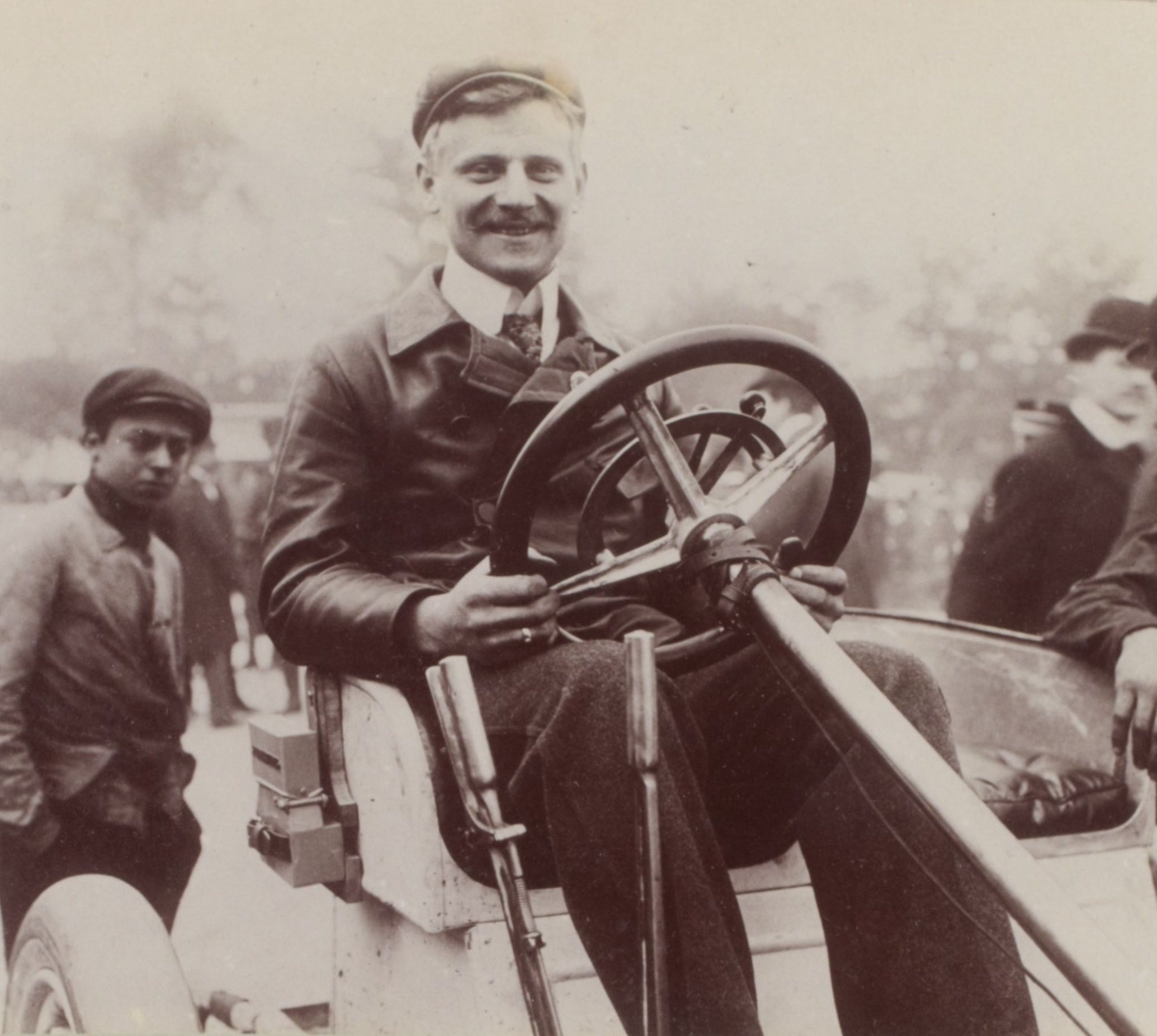 [Collection Jules Beau. Photographie sportive] : T. 21. Année 1903 / Jules Beau : F. 24v. [Paris - Madrid, Tuileries, 19 - 22 mai 1903]